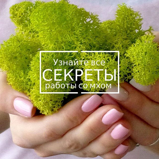 Стабилизированный мох в руках